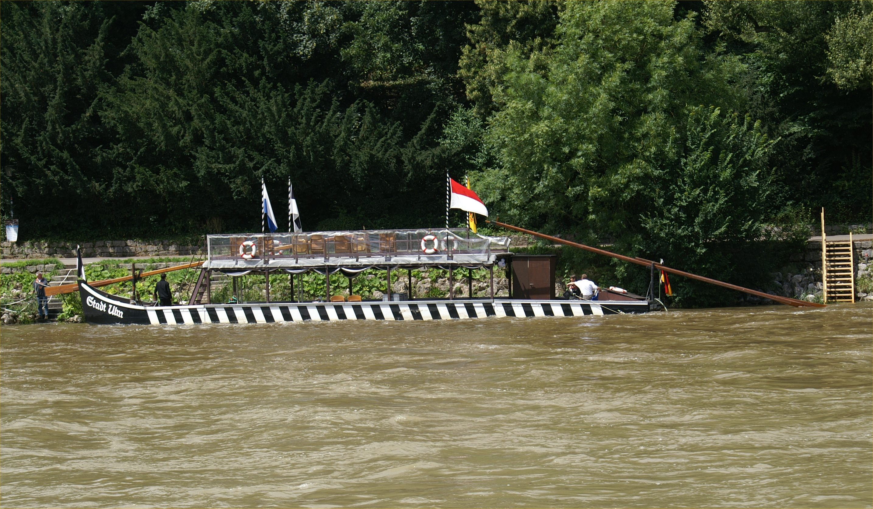 Ulmer Schachtel "Stadt Ulm"